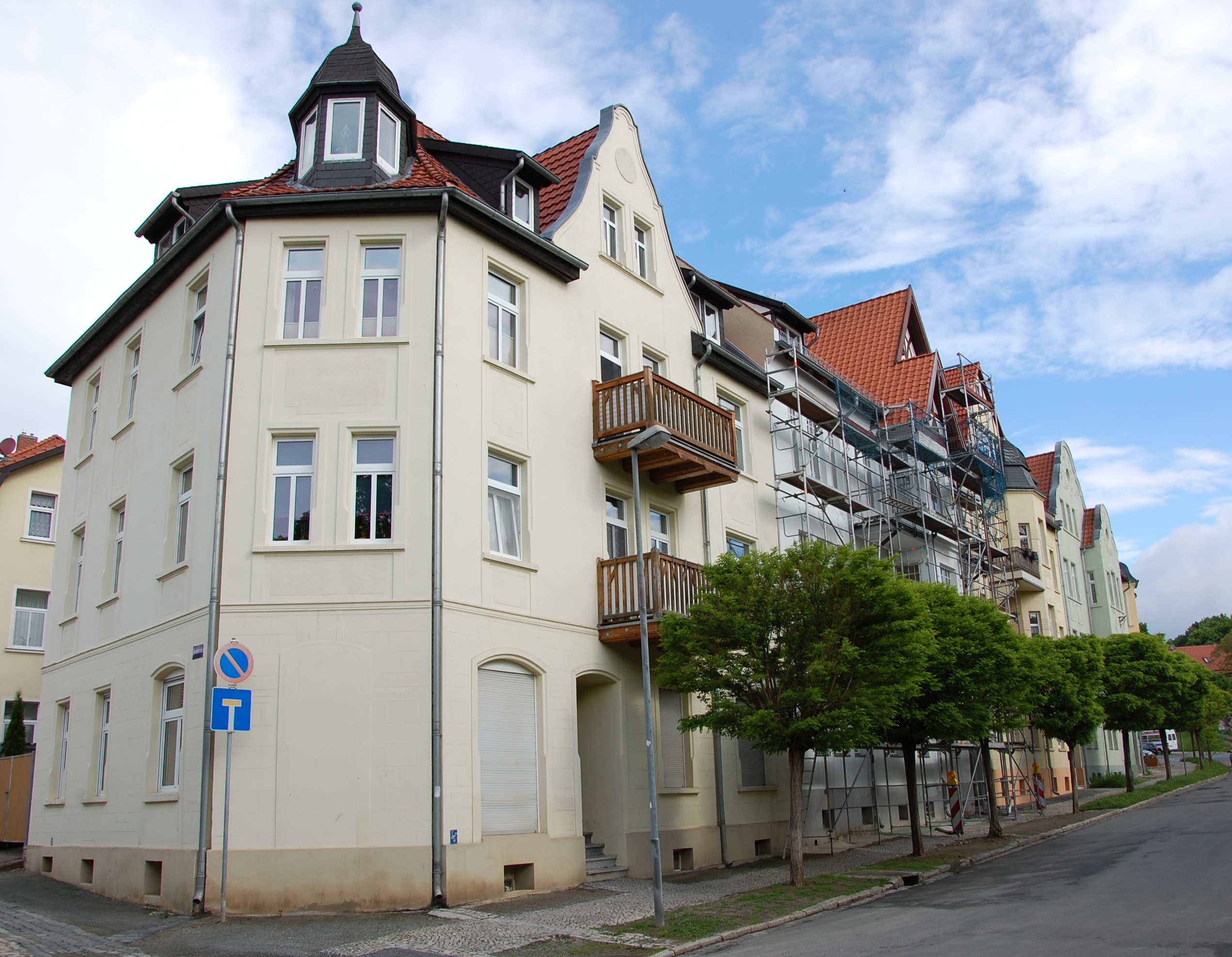 Haus Gröpern 15-18a in Quedlinburg